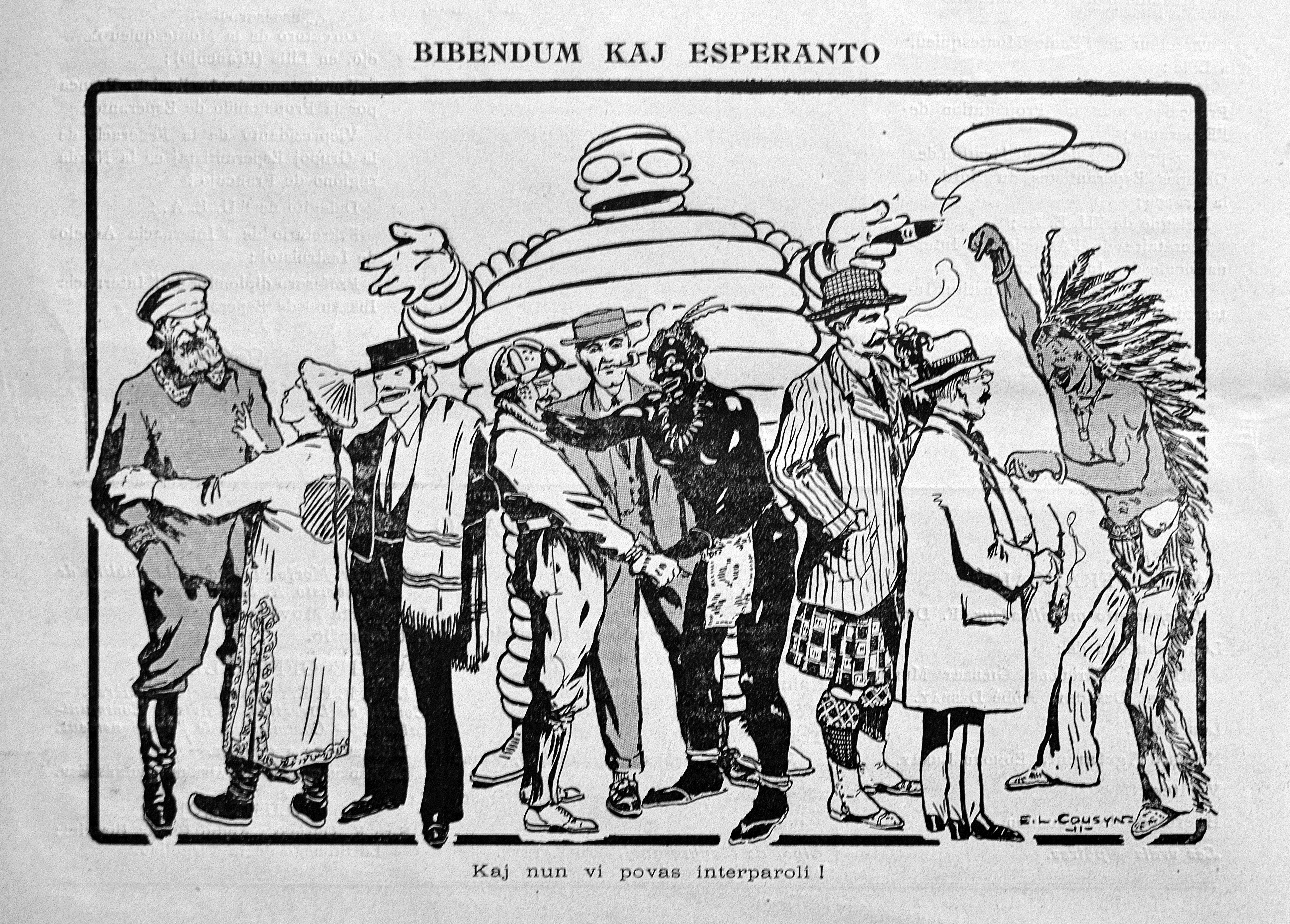 Reklamo de Michelin kun Bibendum en Esperanto